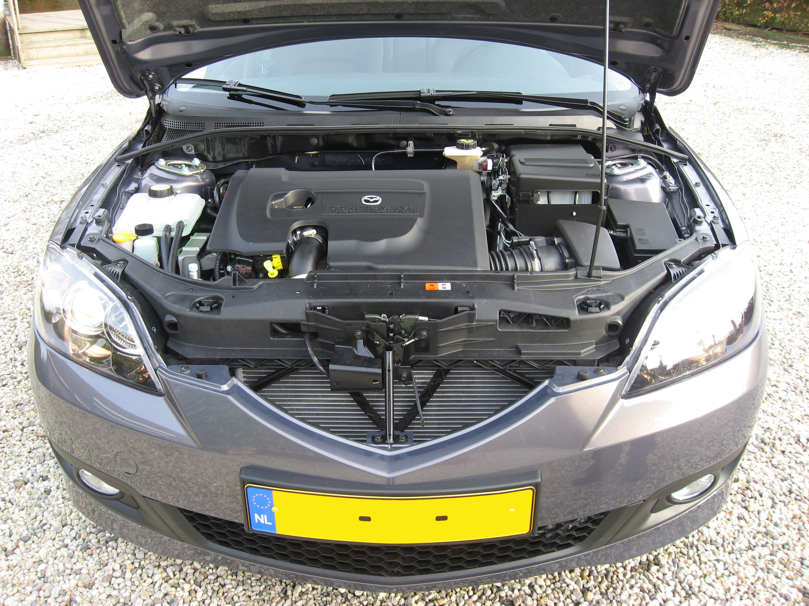 Common Rail Turbodiesel Mazda 3 2007 model